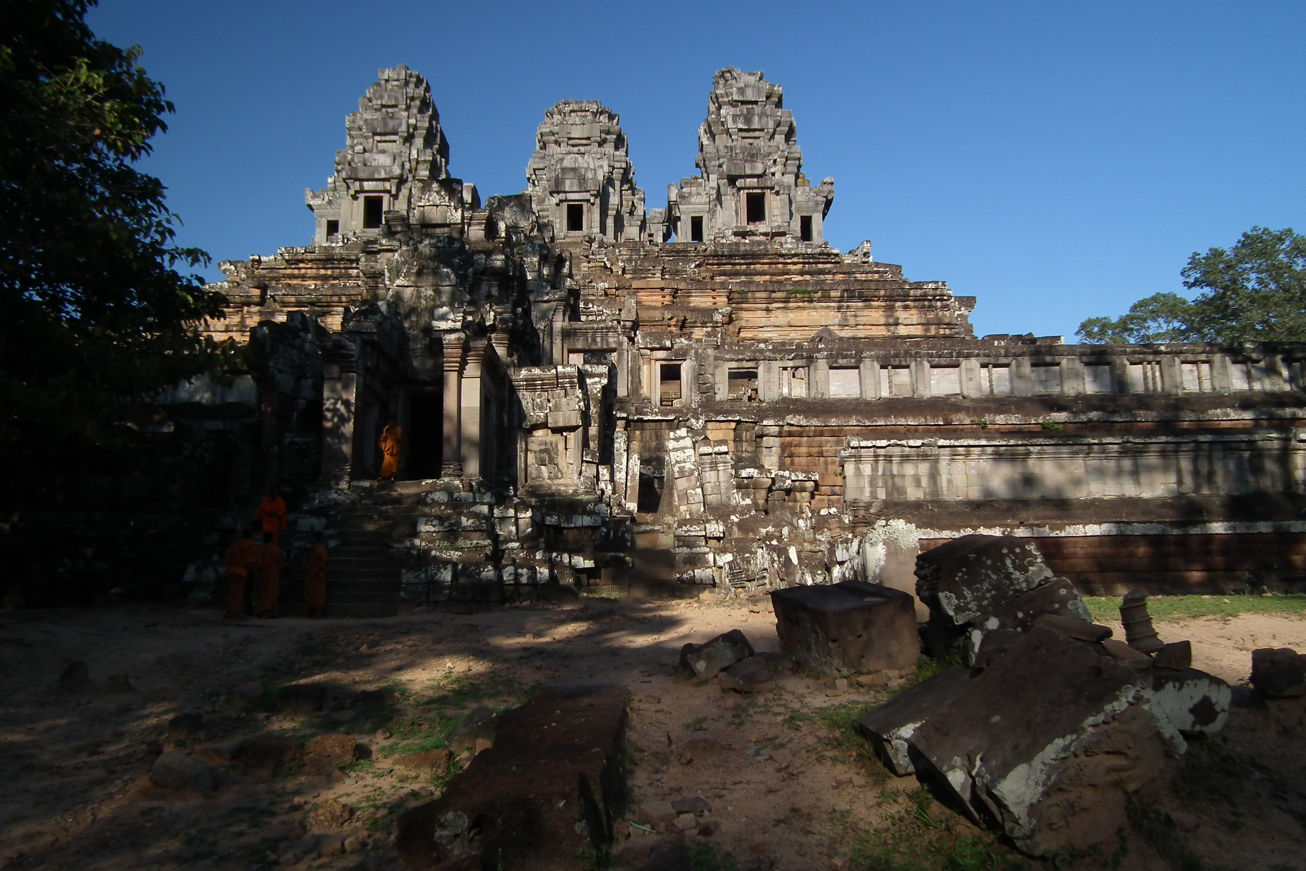 Ta Keo (Khmer ប្រាសាទតាកែវ) Angkor Cambodia タ・ケウ Photo:Akiyoshi Matsuoka